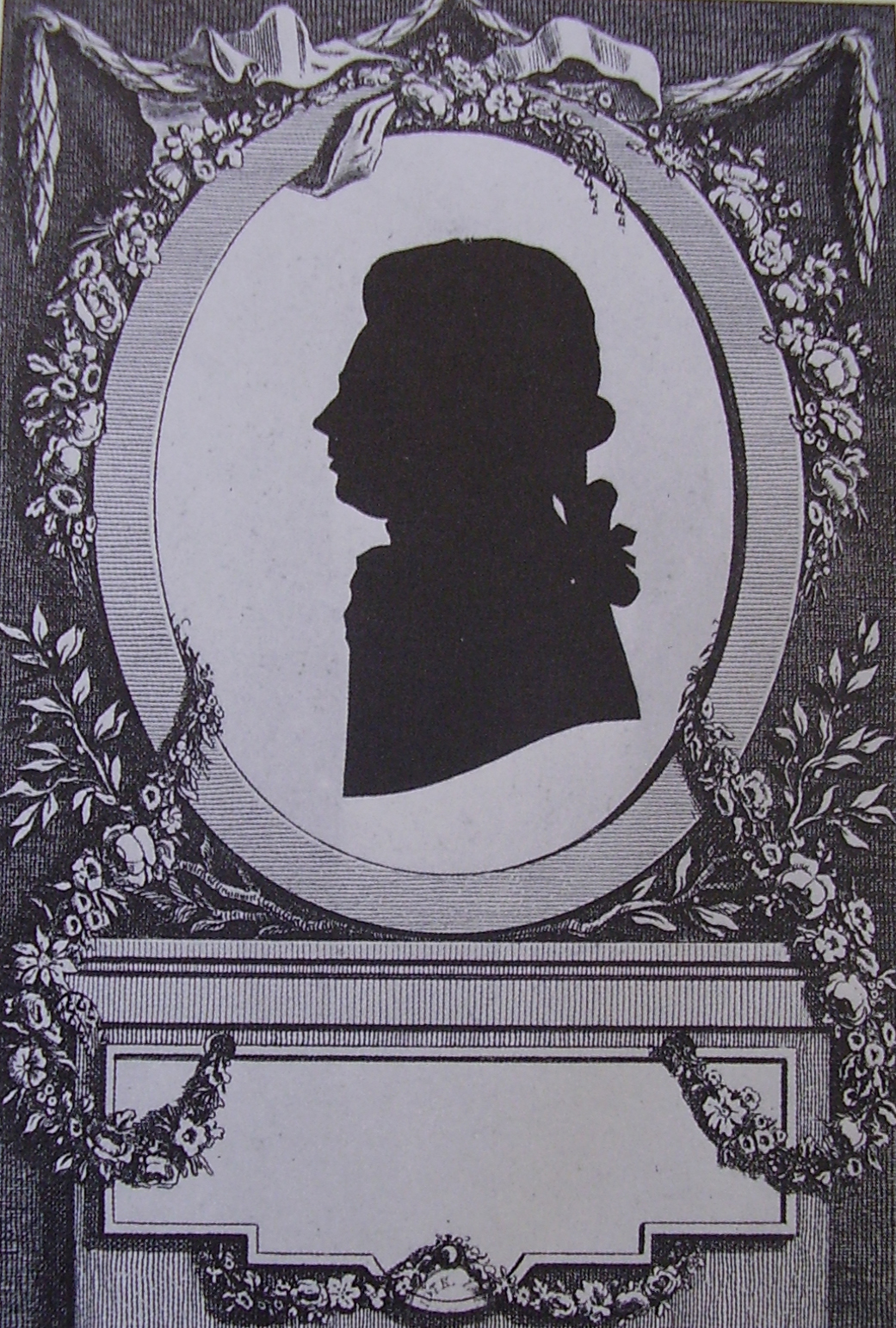 Profil de Joseph Van Praet par Gonnord